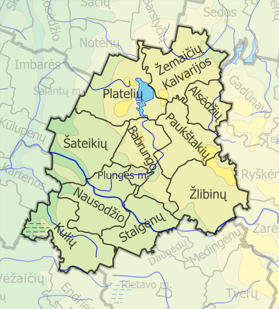 Padaryta iš :image:LietuvosSeniunijos.png